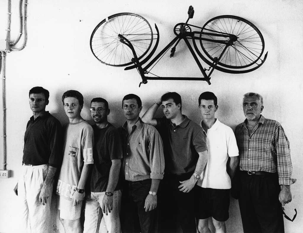 Eredi Brancusi, foto di gruppo, Cherasco 1995